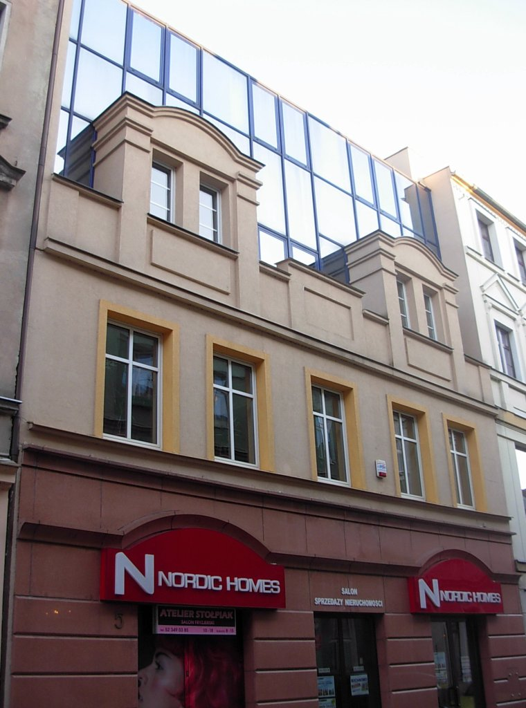 Kamienica Jezuicka 5 Bydgoszcz